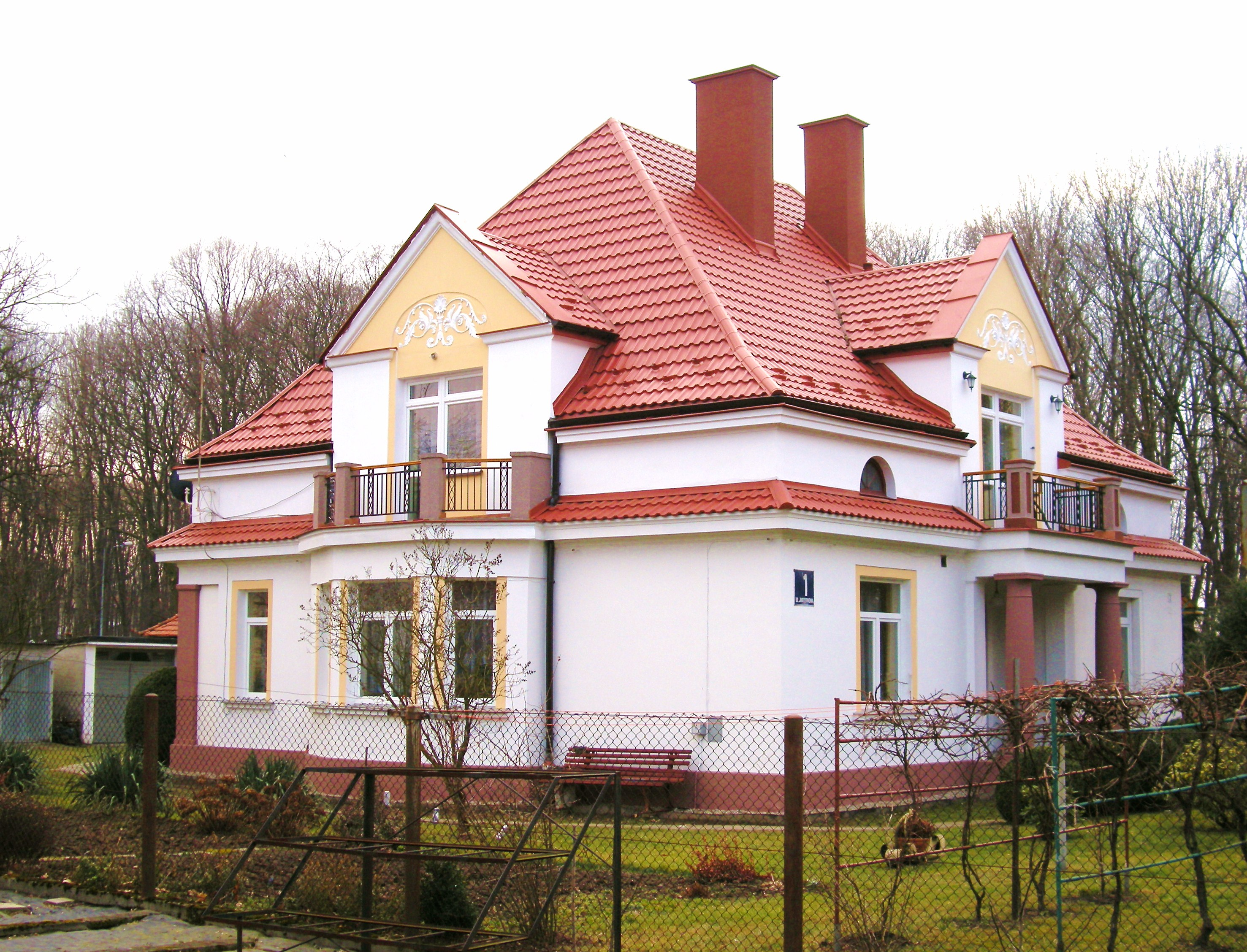 Willa w Tarnowie-Mościcach przy ul. Jarzębinowej